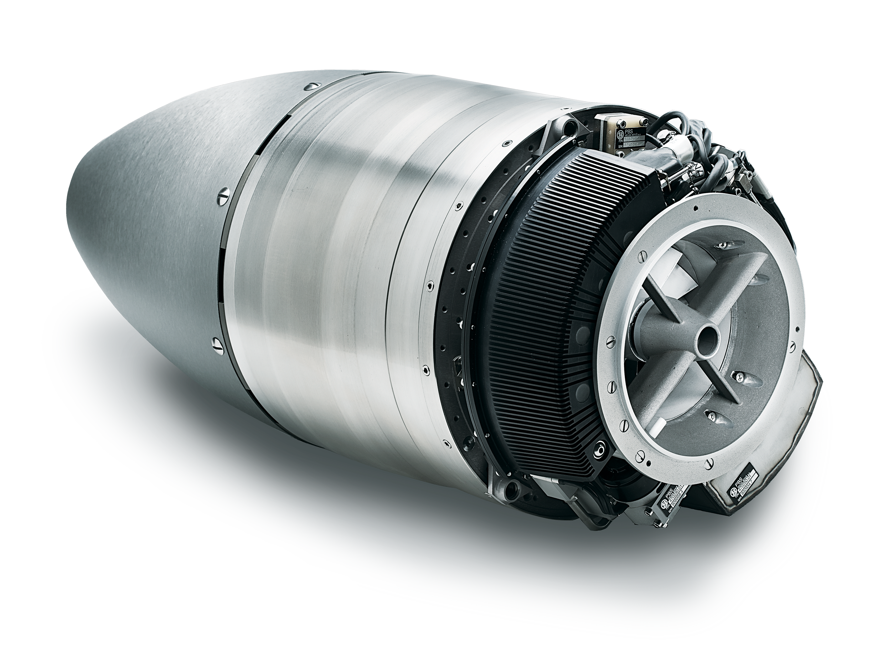 PBS Turbojet engine TJ100 without background